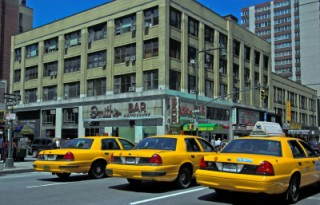 NYC Taxicabs